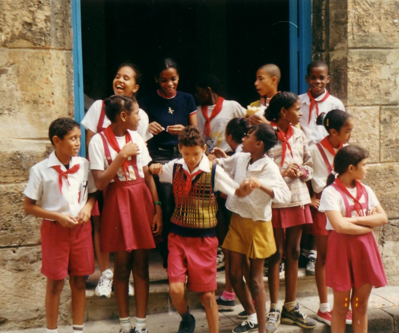 kids in school uniforms, Havana